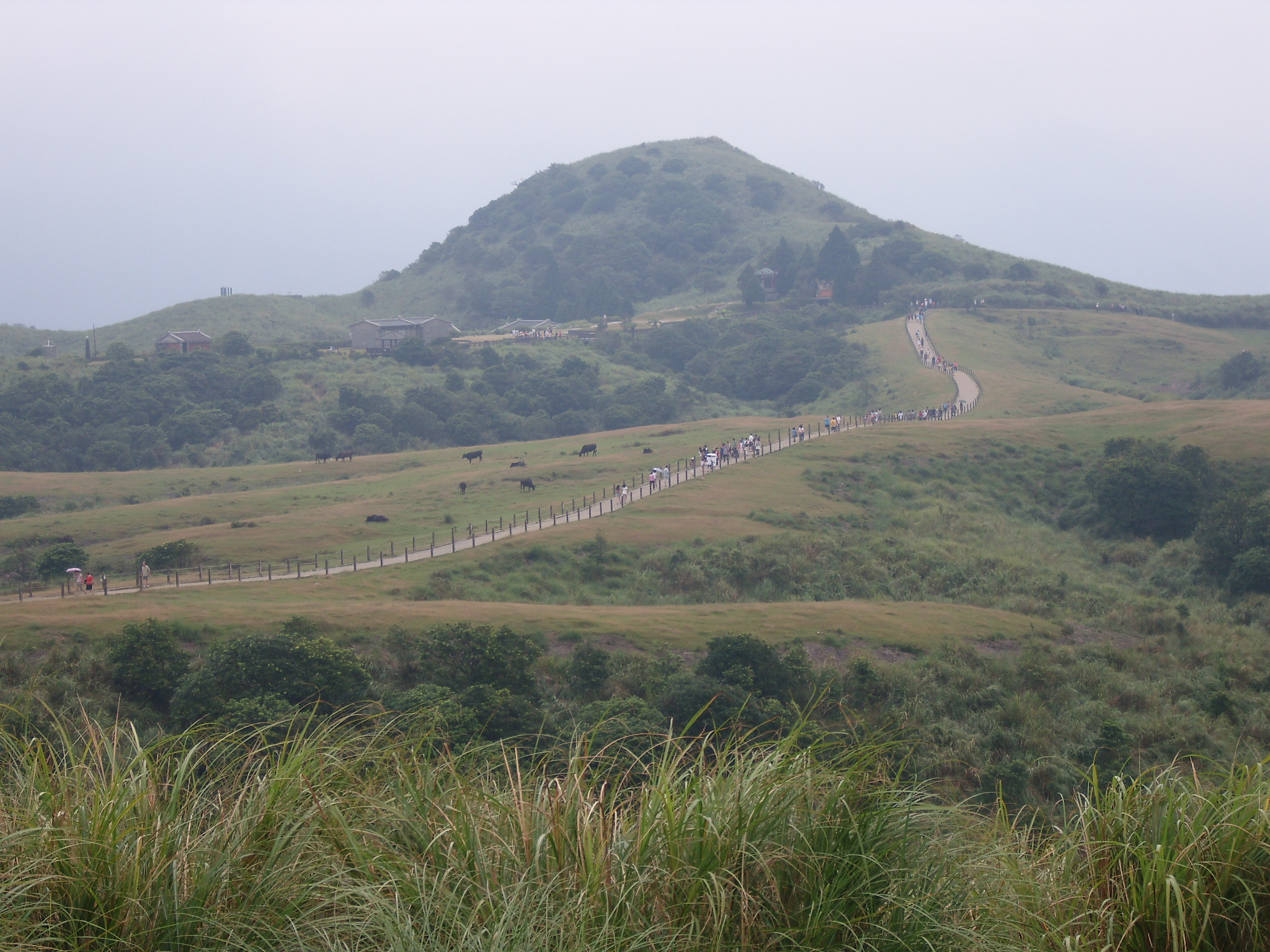 中文（台灣）: 擎天崗草原（陽明山牧場）及後方的擎天崗。